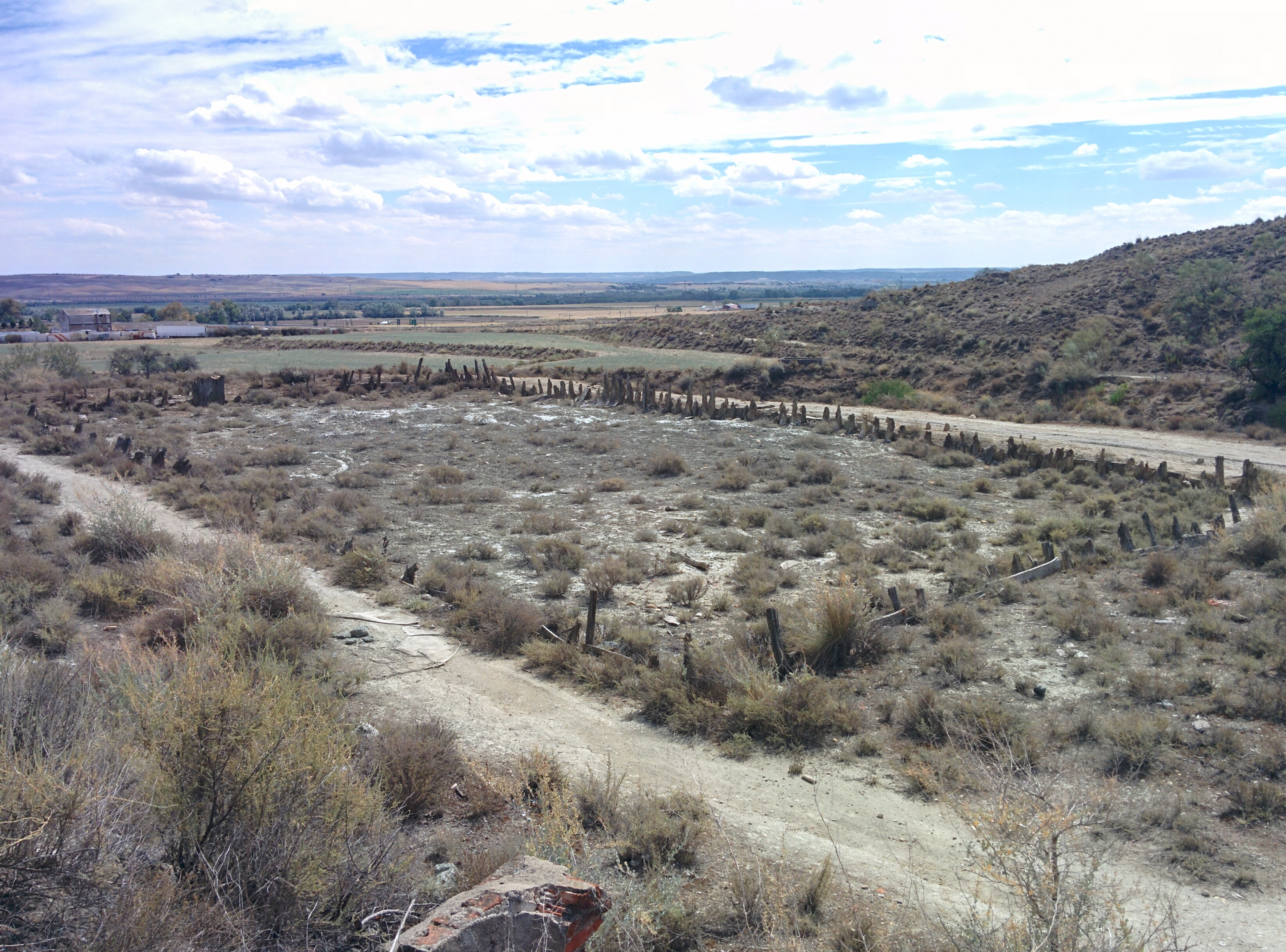 Salinas Espartinas, en Ciempozuelos (Madrid, España).